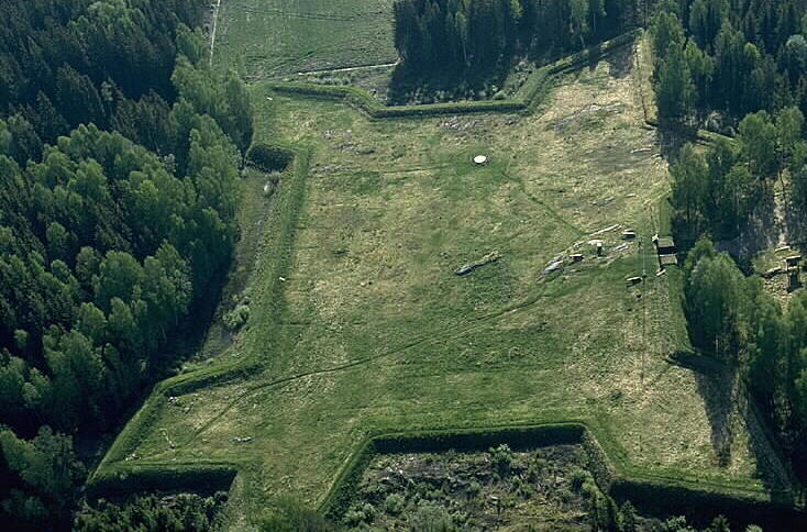 Motiv: Eda skansar Nyckelord: Flygbilder, Raä-Fastigheter, Riksintressen Kategori: Skans Eda skansar.